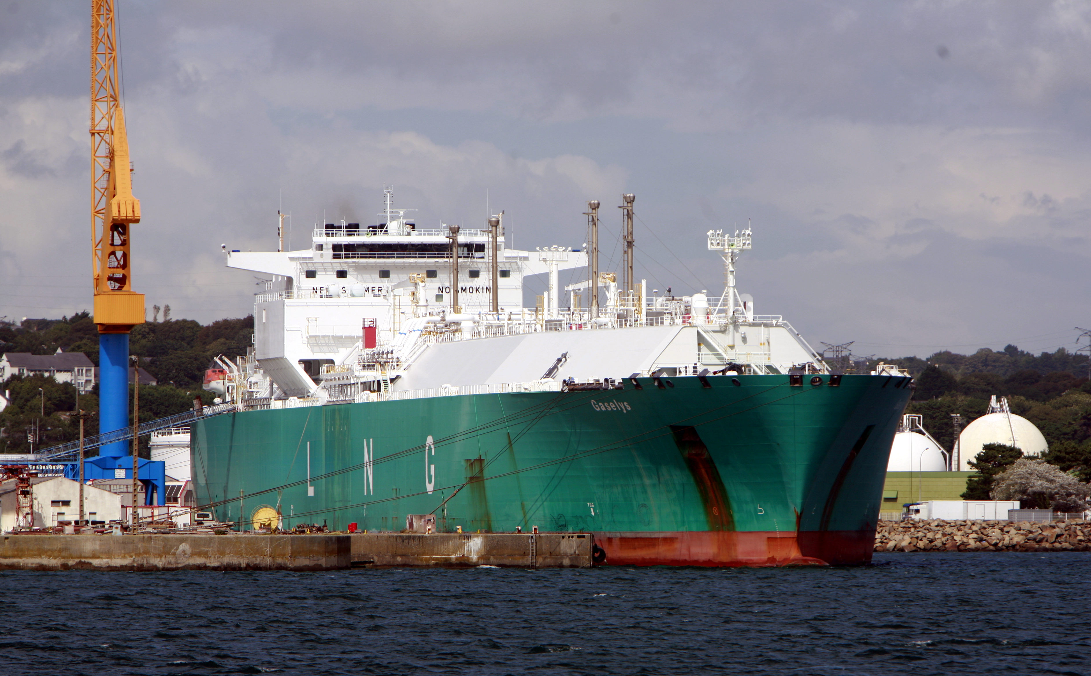 Gaz de France LNG carrier Gaselys in Brest harbour